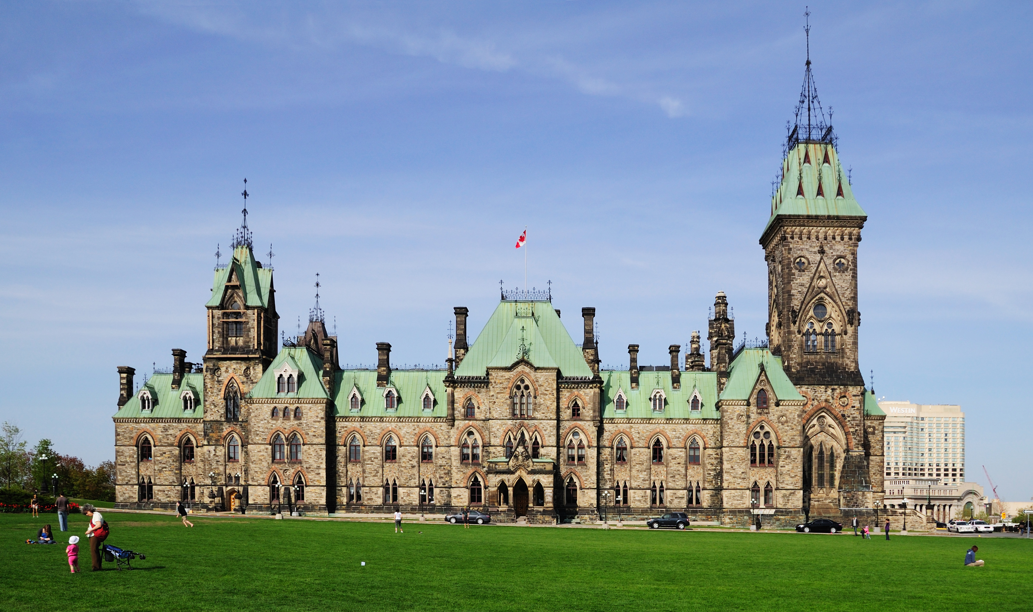 Ottawa: East Block des Parlamentsgebäudes